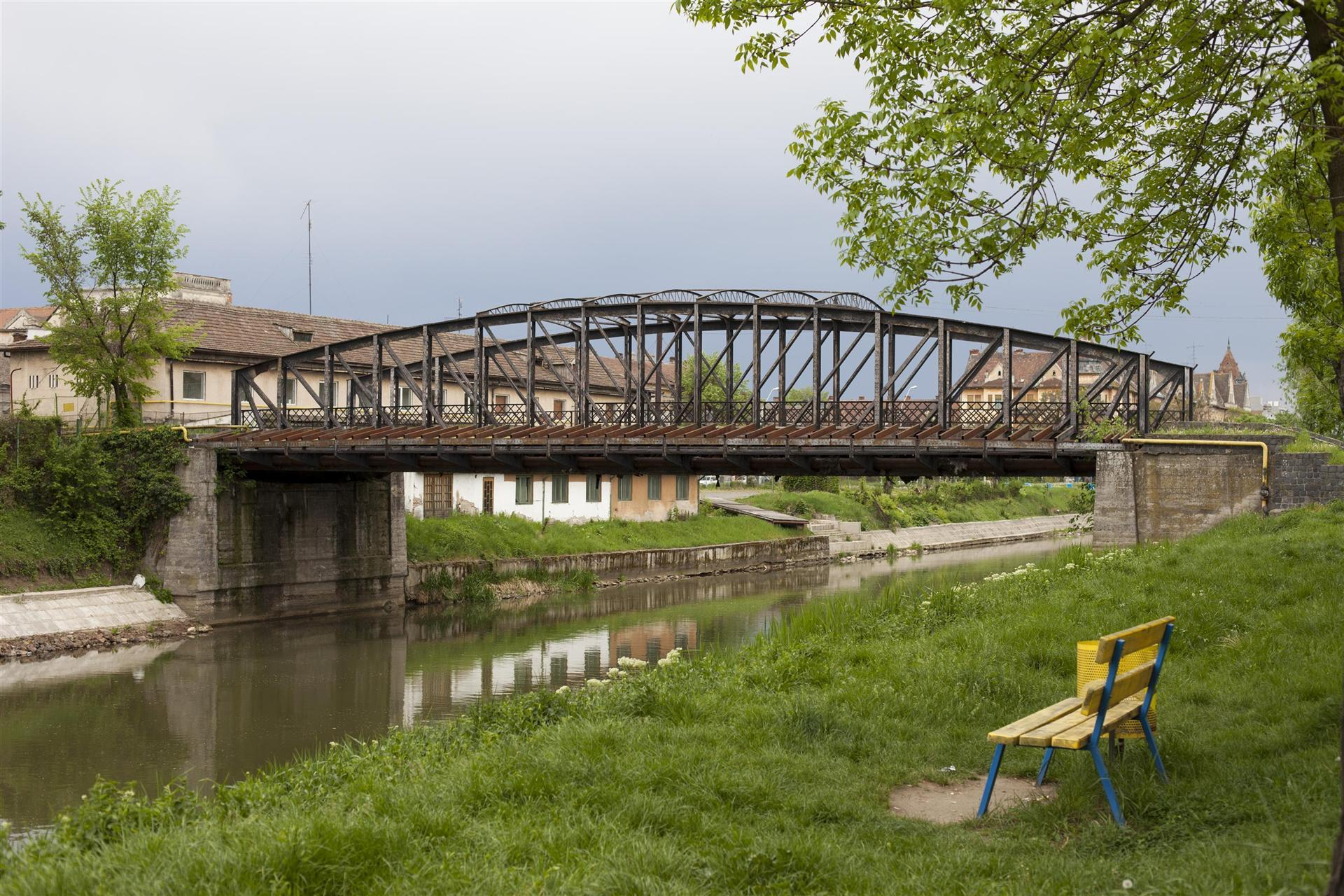 Podul de Fier de pe Canalul Bega